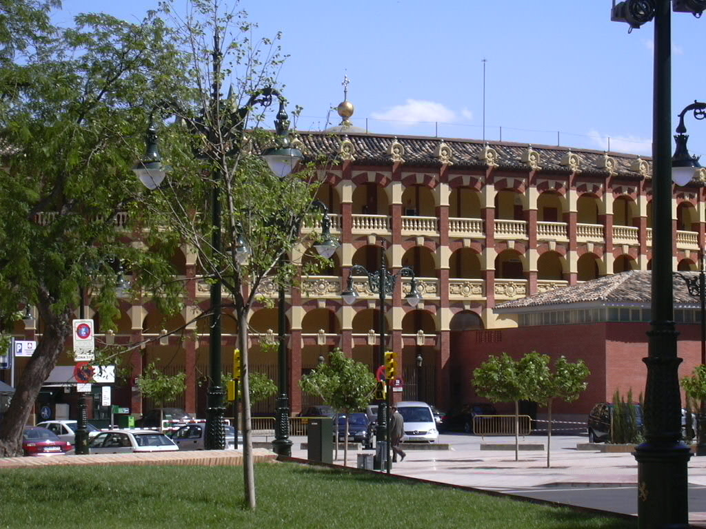 Plaza de Toros de la Misericordia de Zaragoza